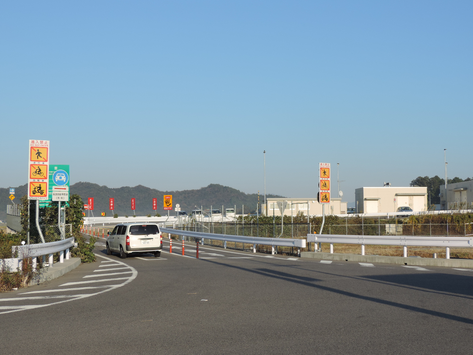 蒲生IC上り線出入口（滋賀県東近江市：2017年撮影）